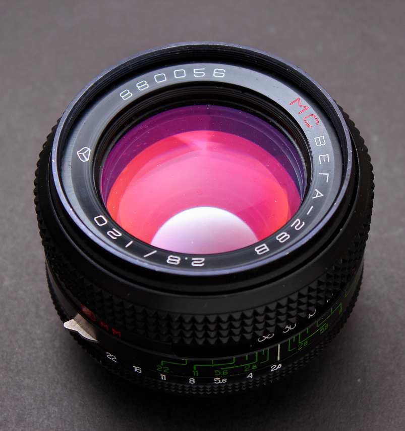 Объектив «Вега-28В» 2,8/120